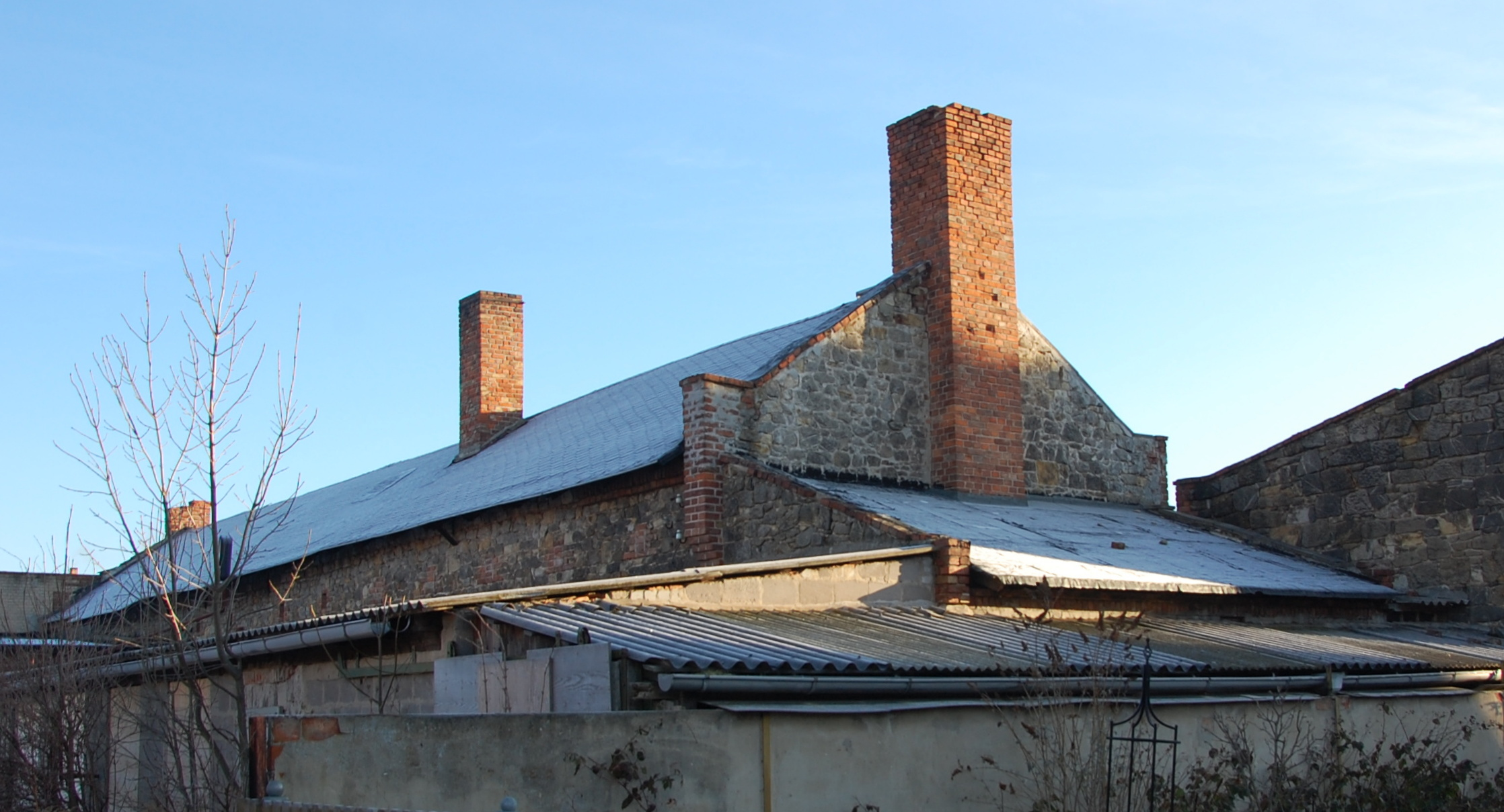 Hofbebauung Haus Otto-Franke-Straße 34 in Gernrode